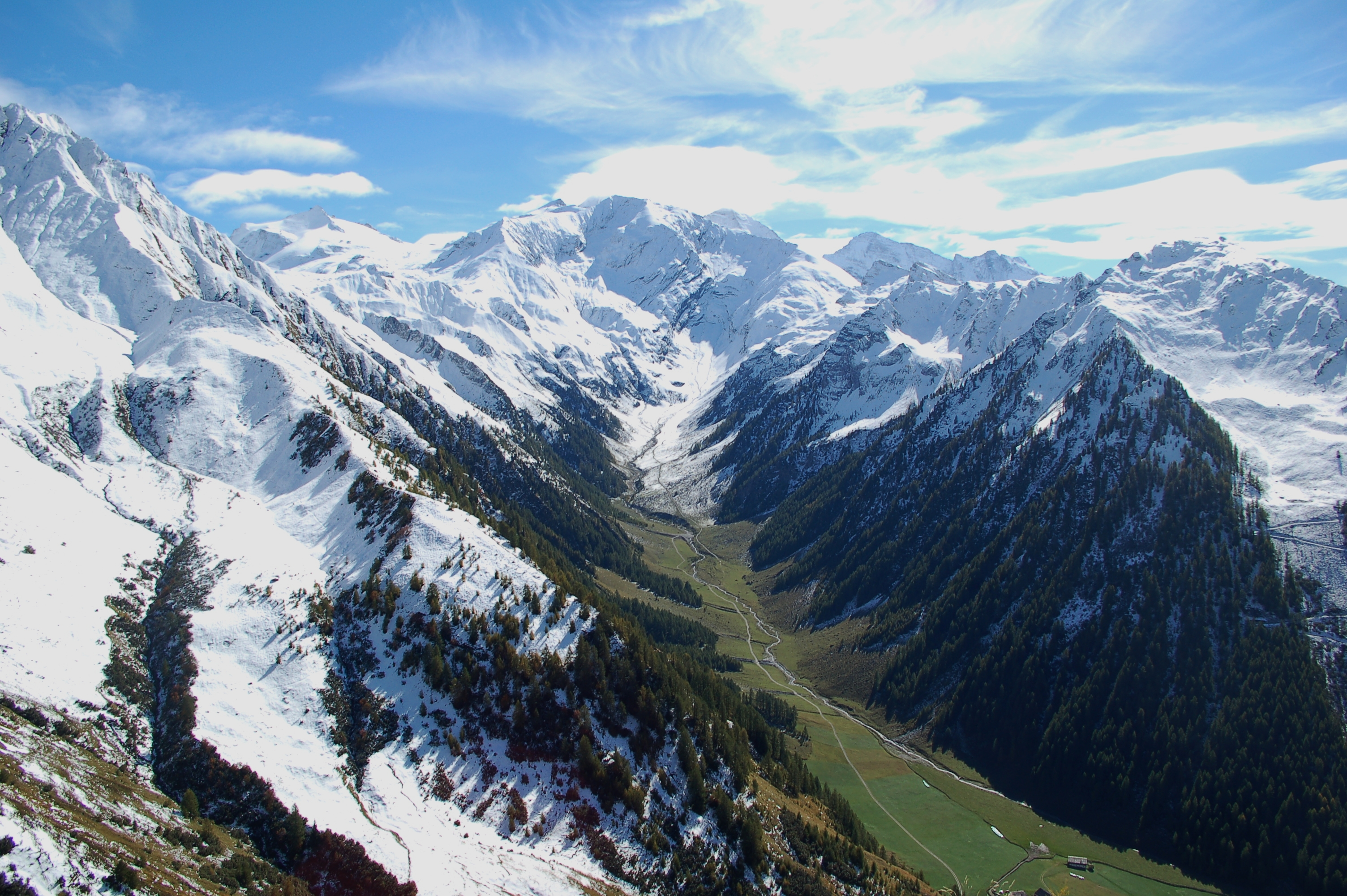 Der Kaserer Winkel mit dem imposanten Kleinen Kaserer; im Hintergrund links die Gefrorenen-Wand-Spitzen, in Nebel Olperer und Fußstein, angedeutet links neben dem Kleinen Kaserer der Große Kaserer und rechts Jochgrubenkopf mit den Schöberspitzen.